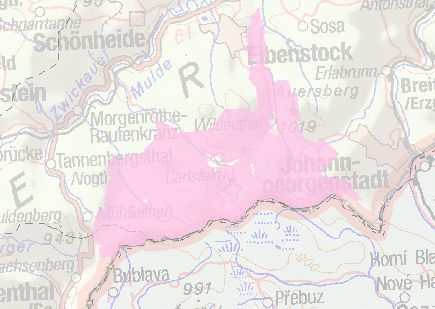 Der Große Kranichsee ist Teil des SPA-Gebietes (Vogelschutzgebietes) „Westerzgebirge“ und Kernstück des Natura 2000-Schutzgebietes „Erzgebirgskamm am Großen Kranichsee“. Hier in einer Darstellung des Bundesamts für Naturschutz, in Rot das Vogelschutz- und in Gelb (bei der Darstellung beider Gebiete weitgehend überlagert vom Rot des Vogelschutzgebietes) das FFH-Gebiet. [1], abgerufen am 12. September 2015. Nur das Vogelschutzgebiet – rote Fläche: [2], abgerufen am 12. September 2015.